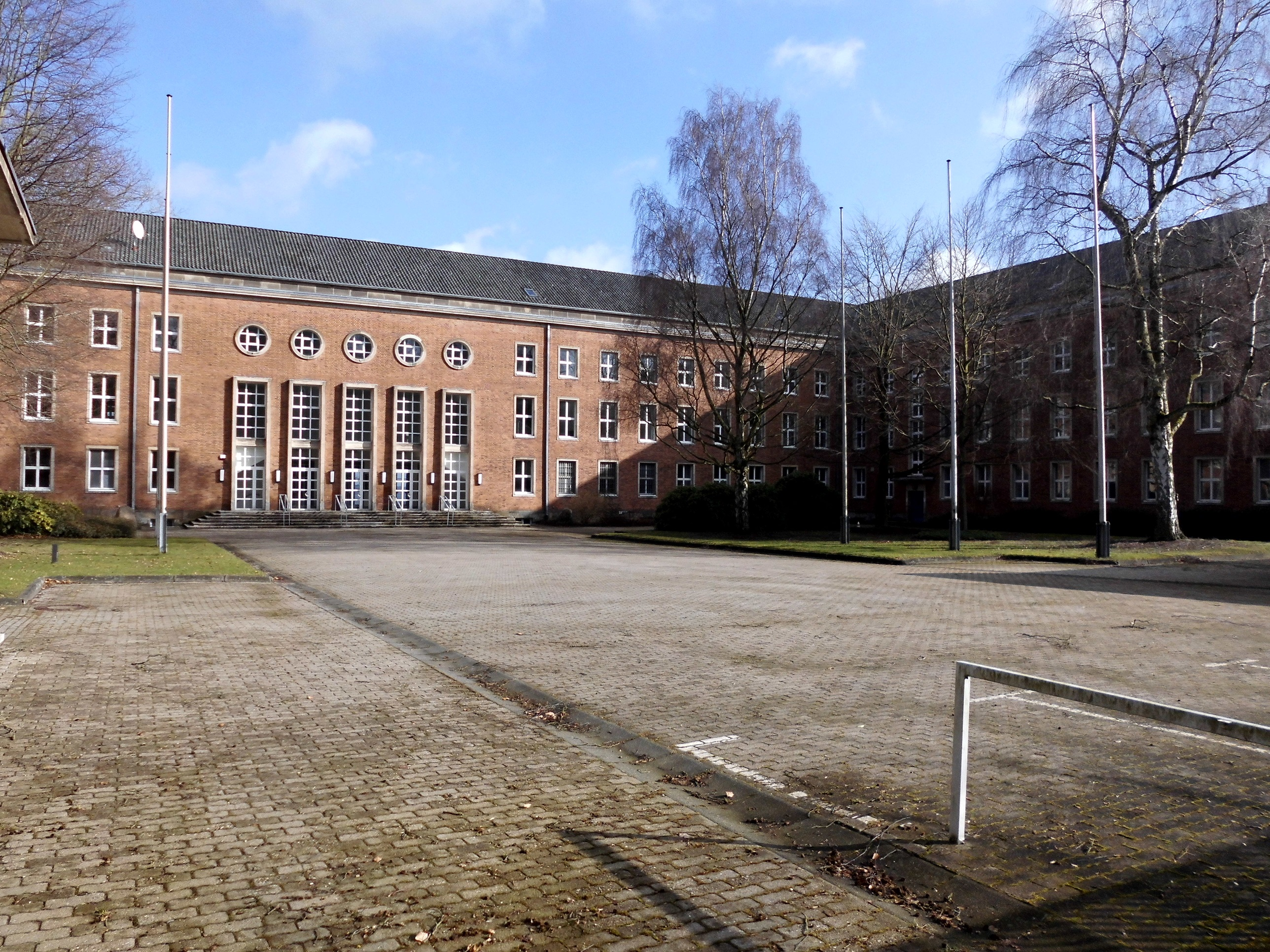 Gebäude des ehemaligen Luftkreiskommandos (Territorialkommando S-H) im Niemannsweg 220 im Kieler Stadtteil Wik.